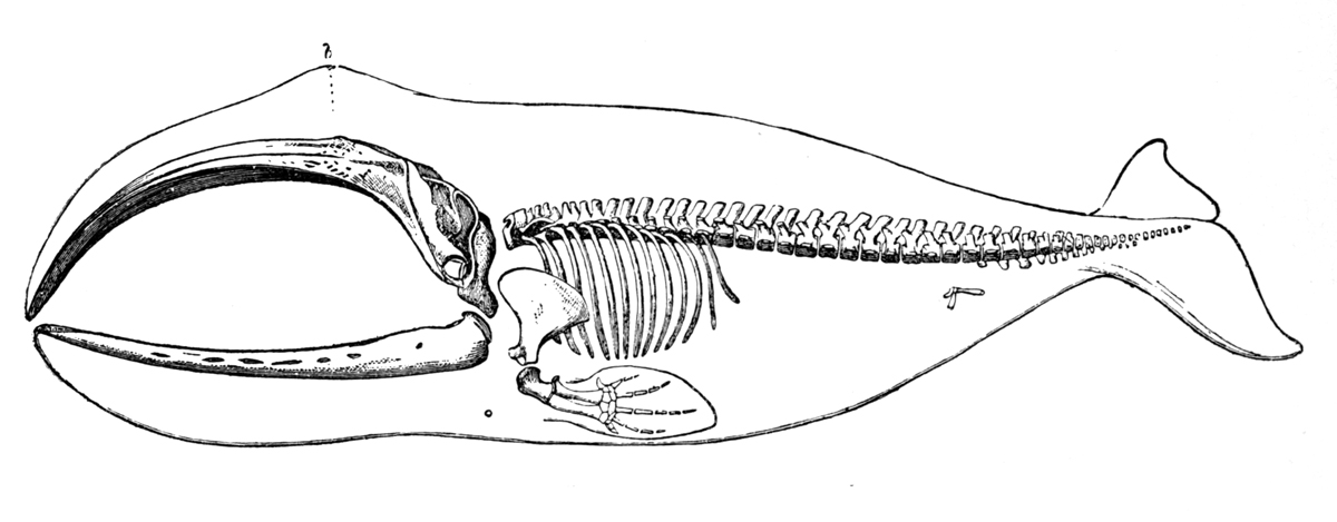 Greenland Whale skeleton